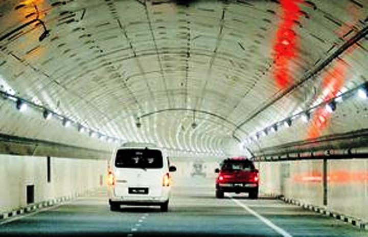 A SMART alagút egyik szintje